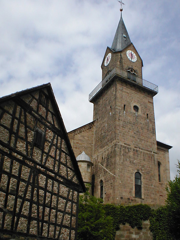 Turm der Stadtkirche St. Mauritius in Güglingen